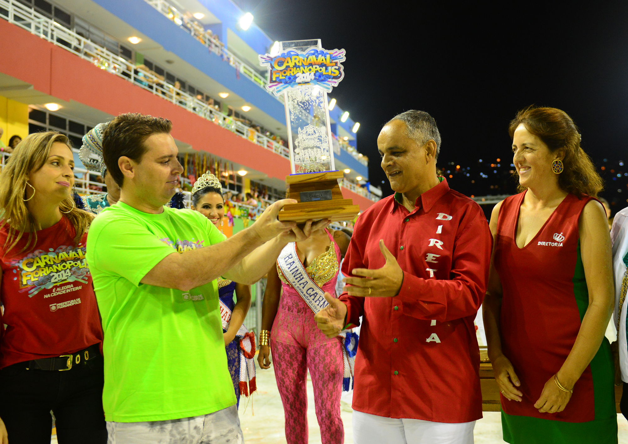 Prefeito de Florianópolis César Souza Junior entrega um prêmio a escola campeã, a Protegidos da Princesa, na Passarela Nego Quirido.